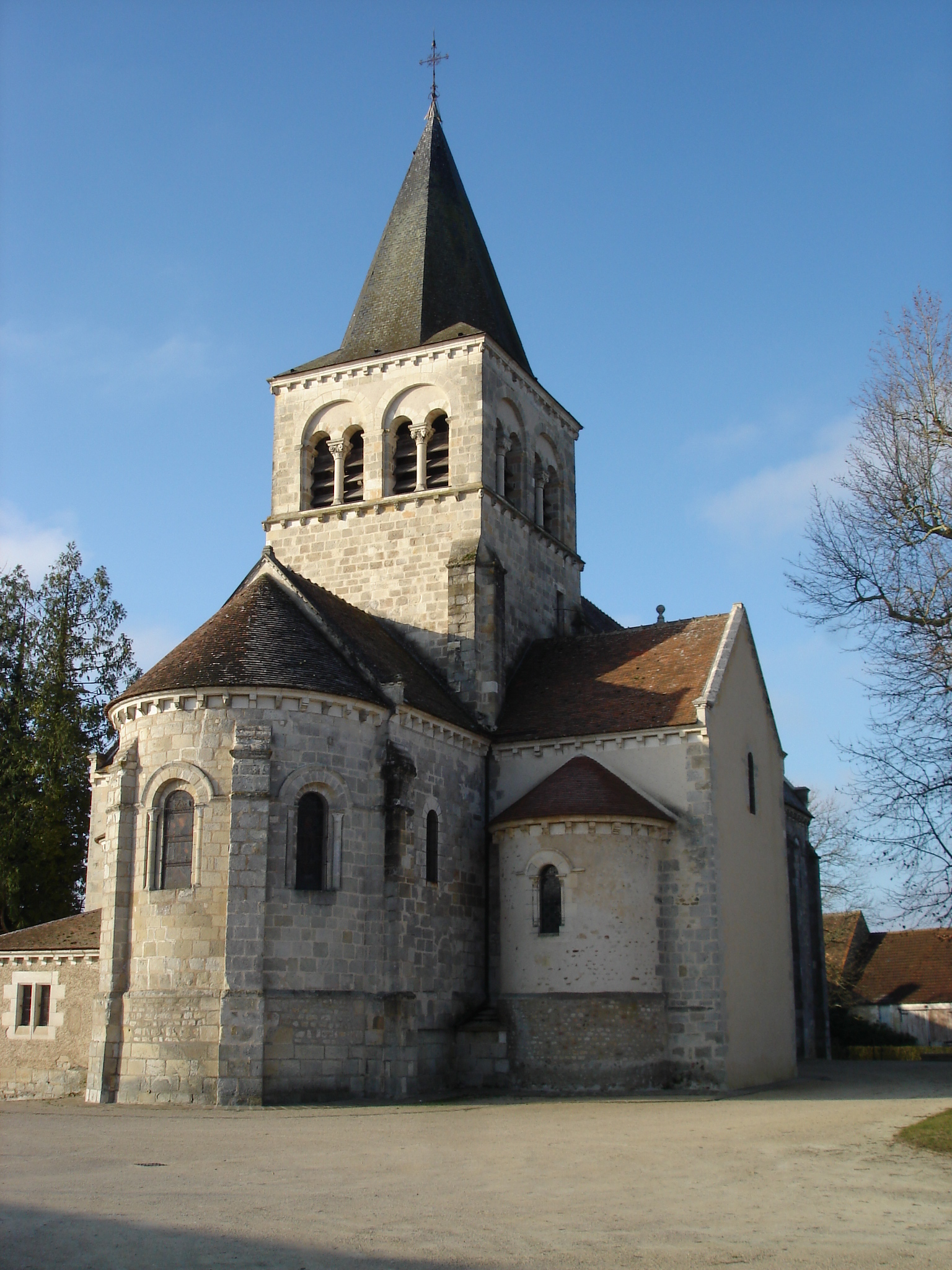 La Berthenoux (36) : L'église Notre-Dame.